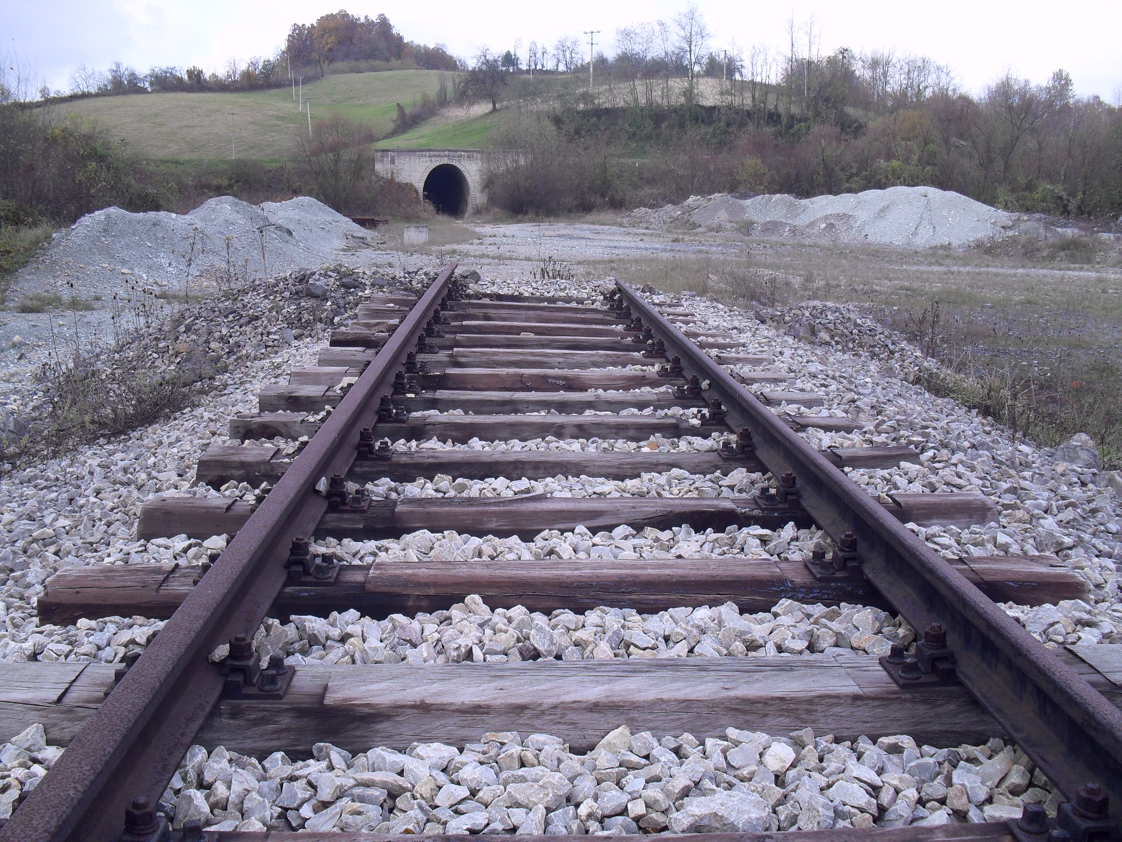 Pruga na izlazu iz stanice Valjevska Kamenica